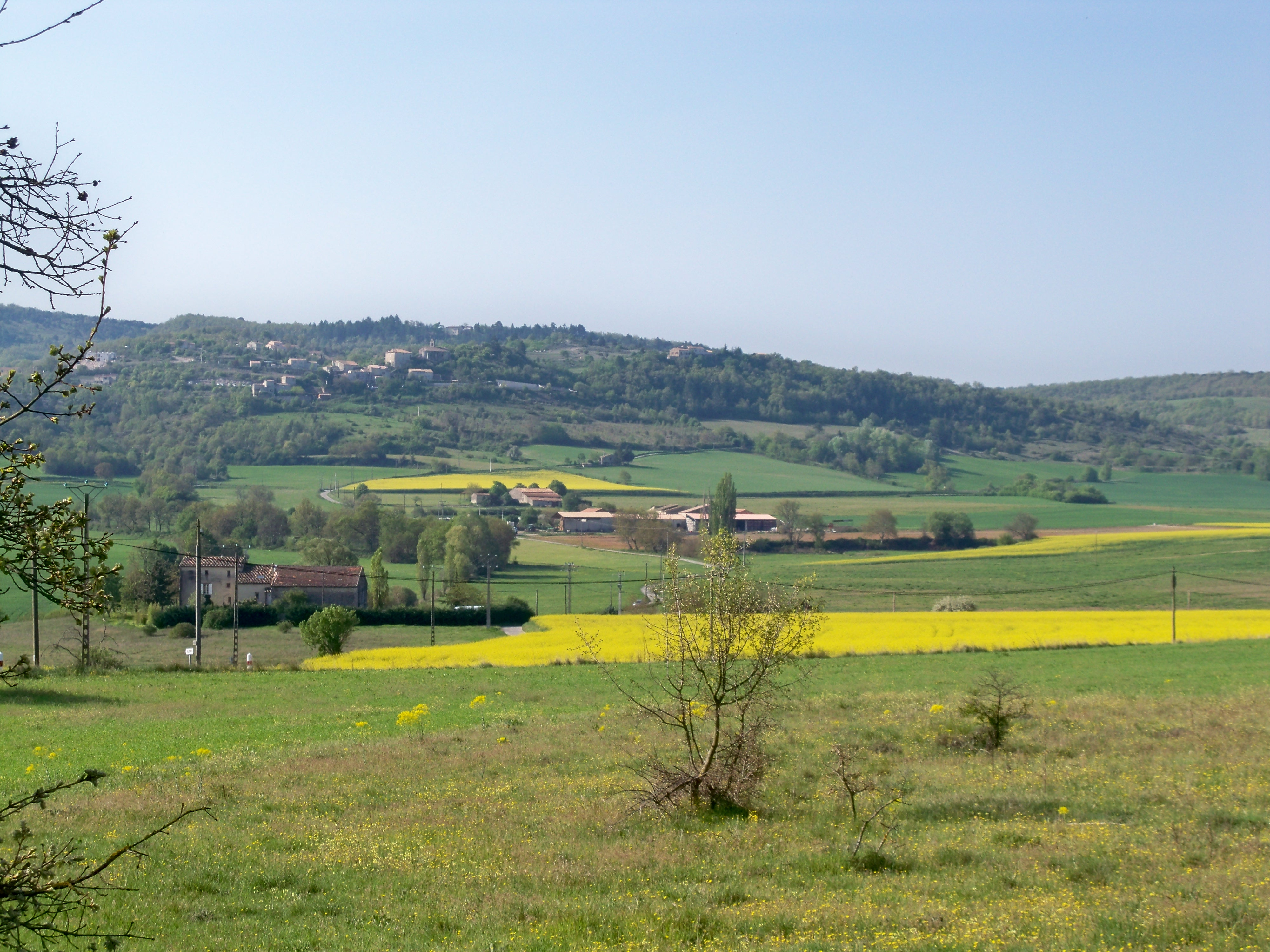 Plaine agricole, au pied du village de Villemus (04), France